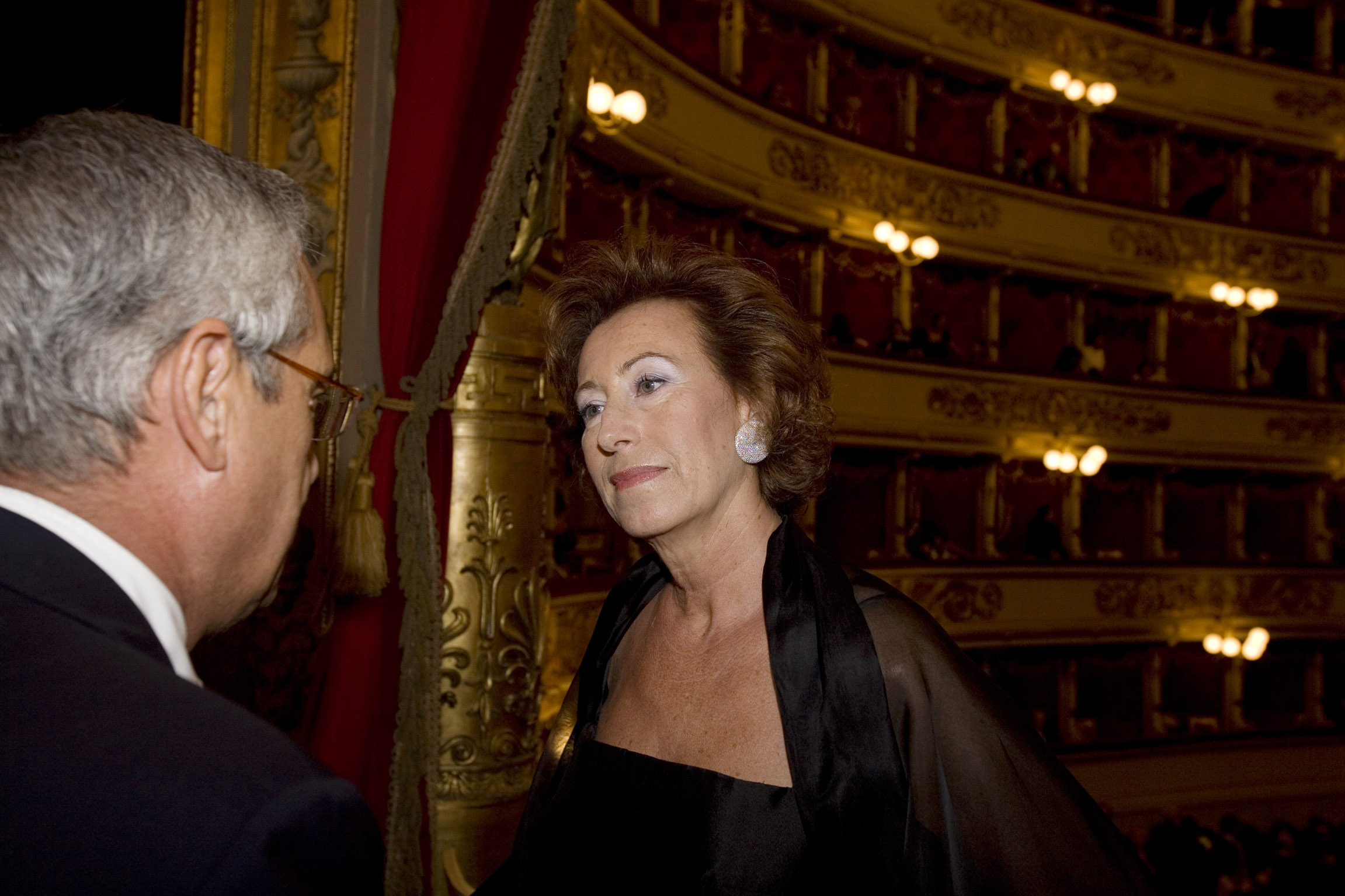 Il Sindaco Letizia Moratti. photo by ©Lelli e Masotti